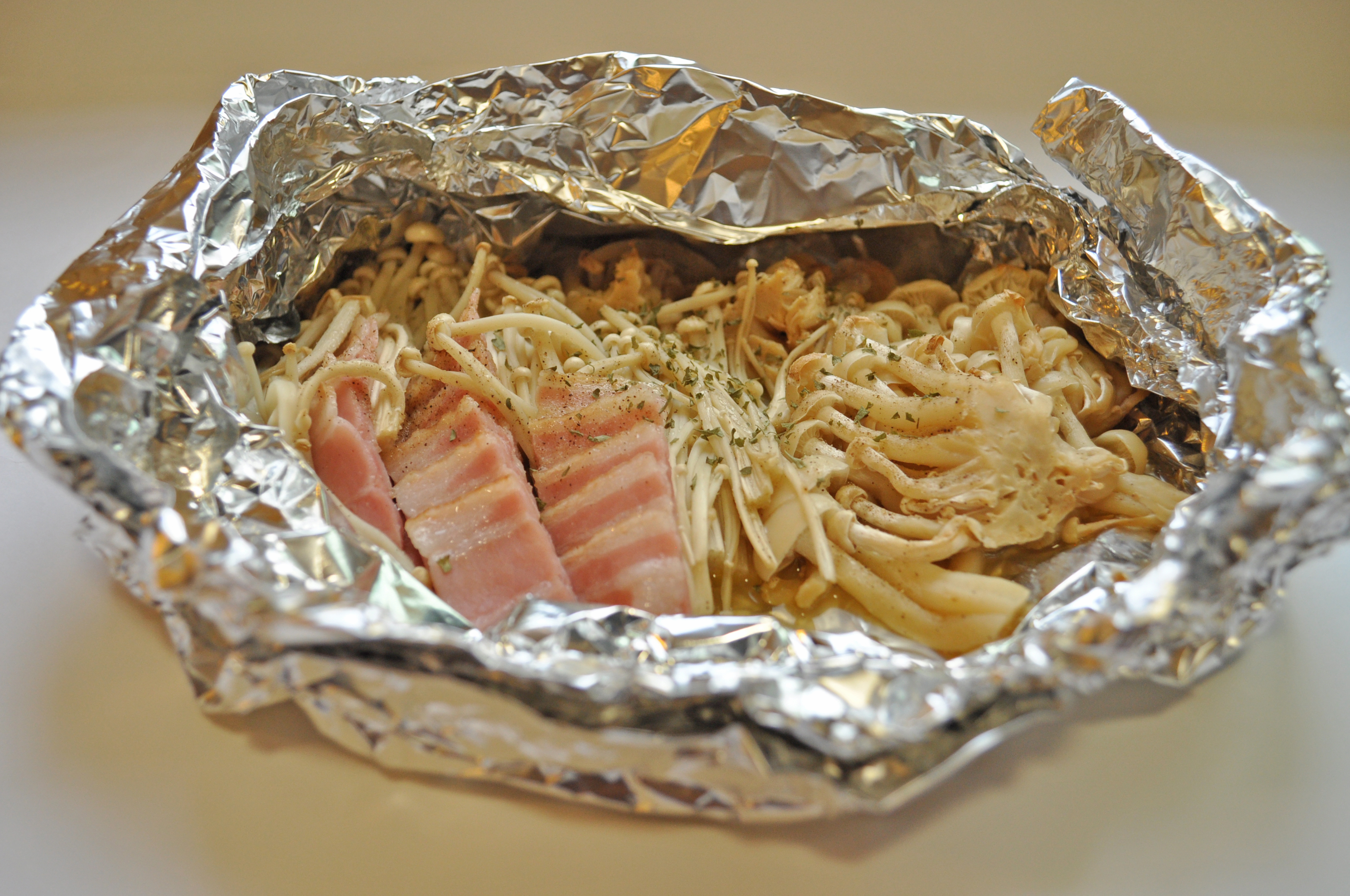 きのことベーコンのホイル焼き